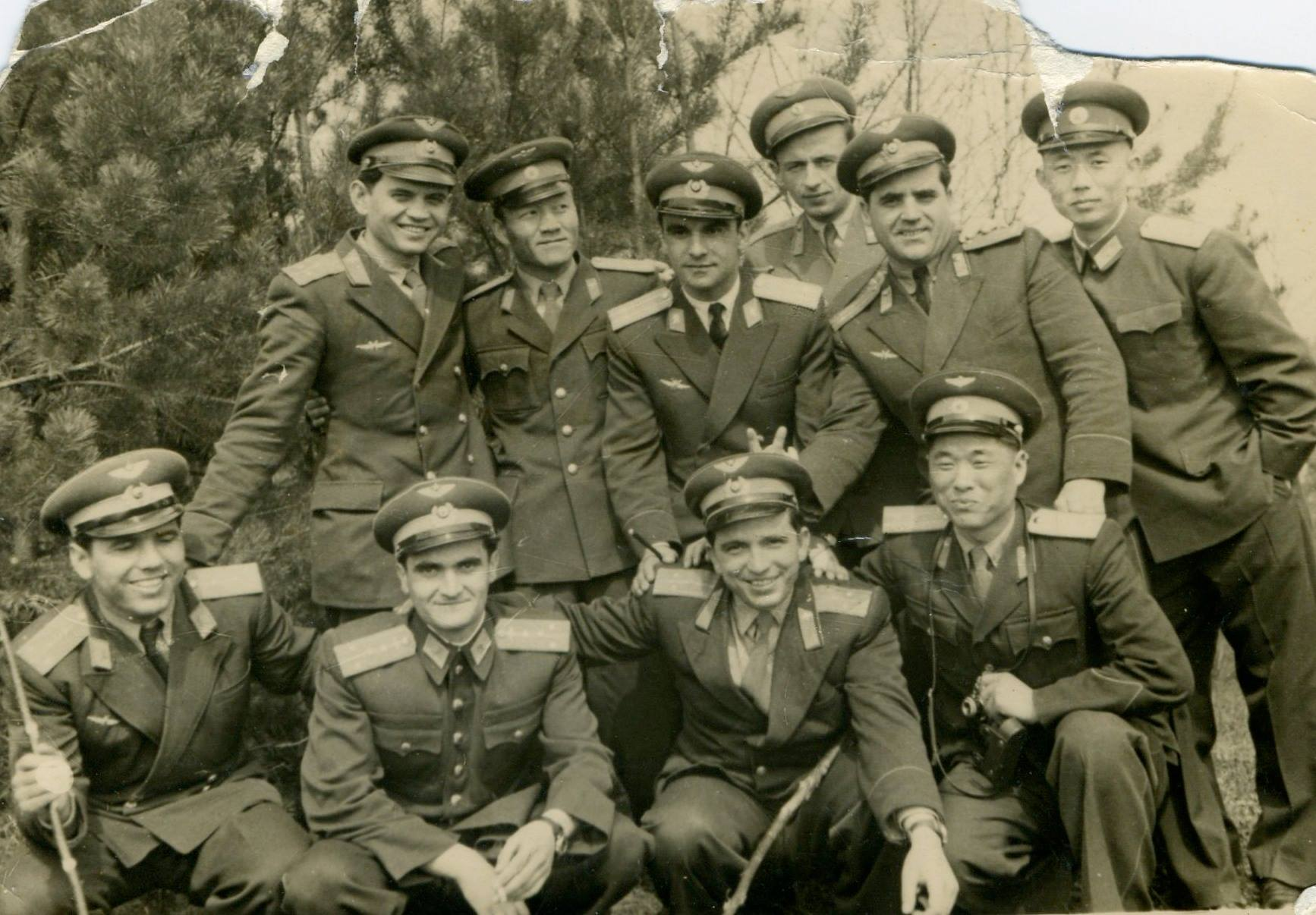 Me shokë në Akademi